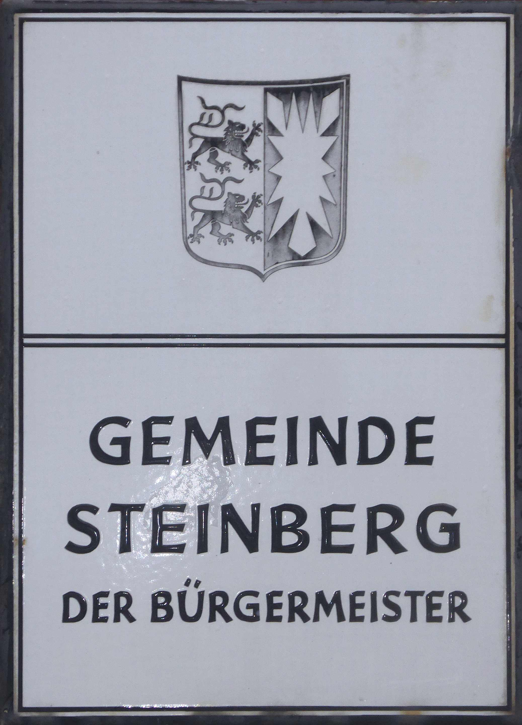 Altes emailliertes schwarz-weißes Amtsschild - Gemeinde Steinberg - Foto Wolfgang Pehlemann P1350892